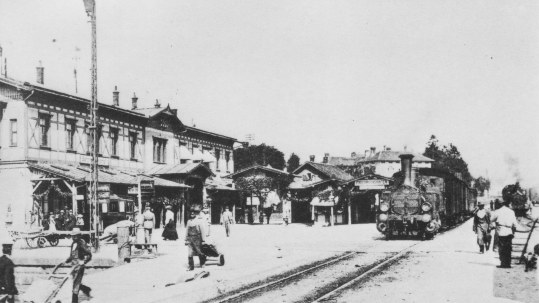 Alter Hafenbahnhof Friedrichshafen mit Lok T2aa "Stuifen"